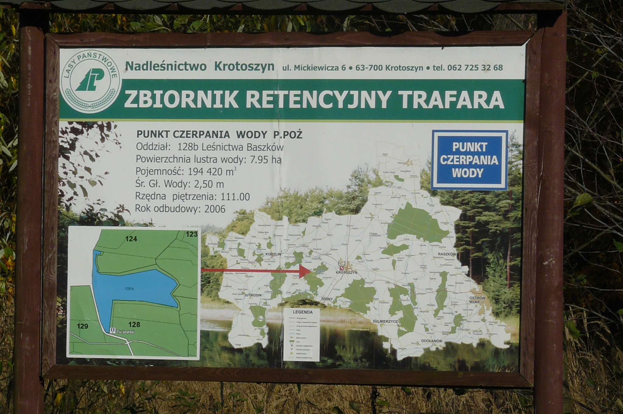 Staw Trafary koło Trzasek - Obszar Chronionego Krajobrazu Dąbrowy Krotoszyńskie i Baszków-Rochy.